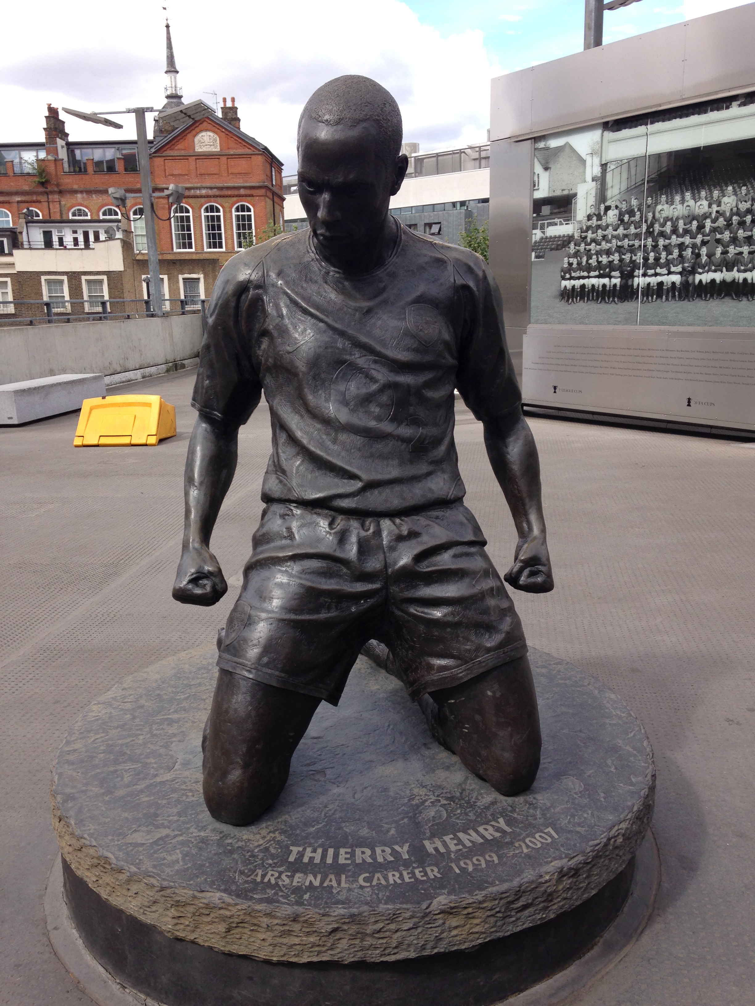 Statue Thierry Henry